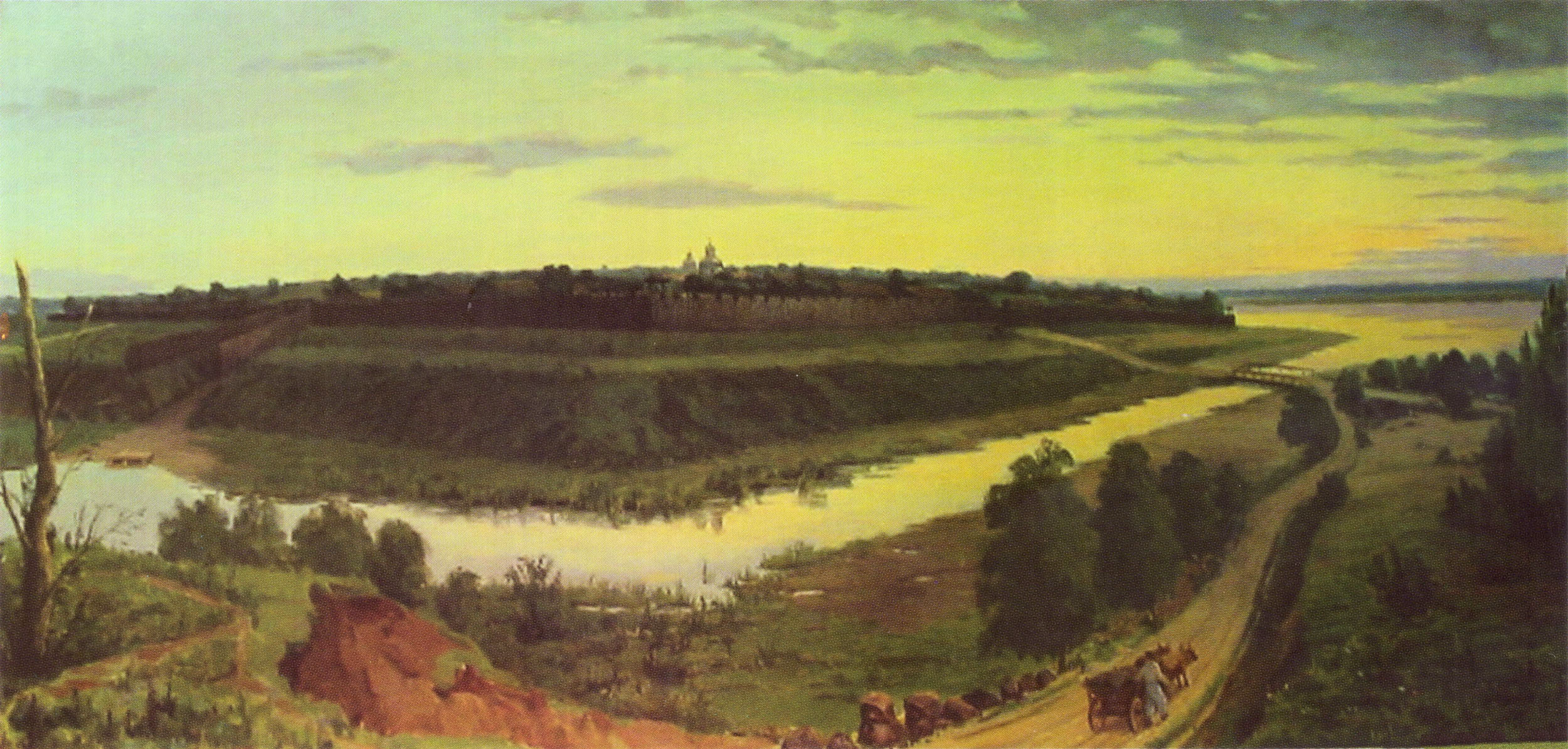 Картина художника В. Г. Шерстюка «Конотопское укрепление XVII век». На переднем плане река Конотопка, справа вдали видно Езуч